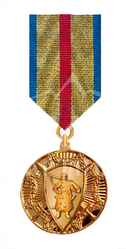 Нагорода